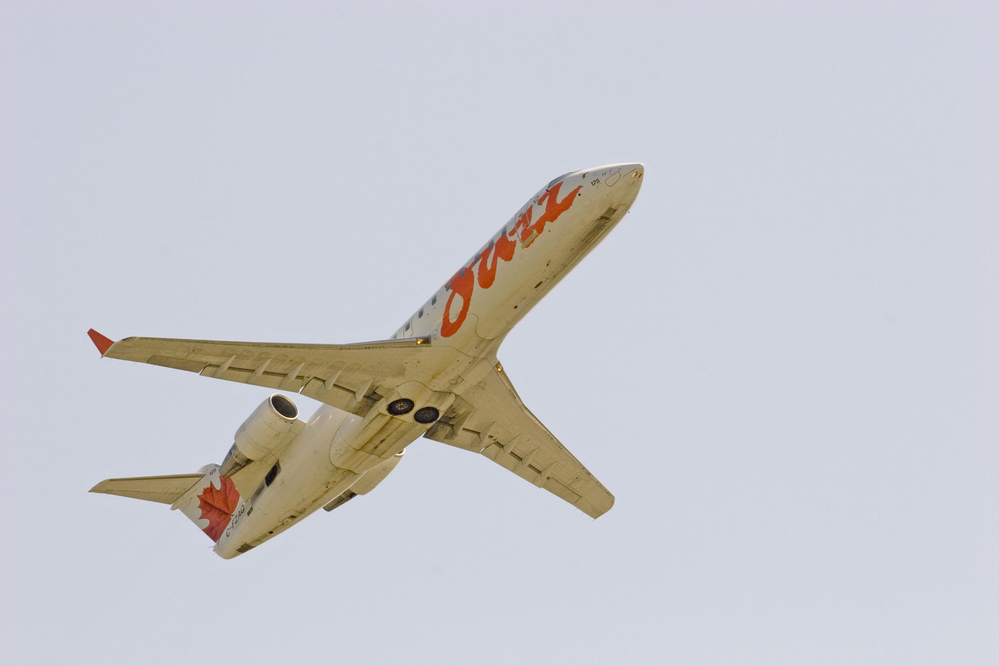 Air Canada Jazz Canadair CL-600-2B19 Regional Jet C-FZAQAir Canada Jazz Canadair CL-600-2B19 Regional Jet C-FZAQ